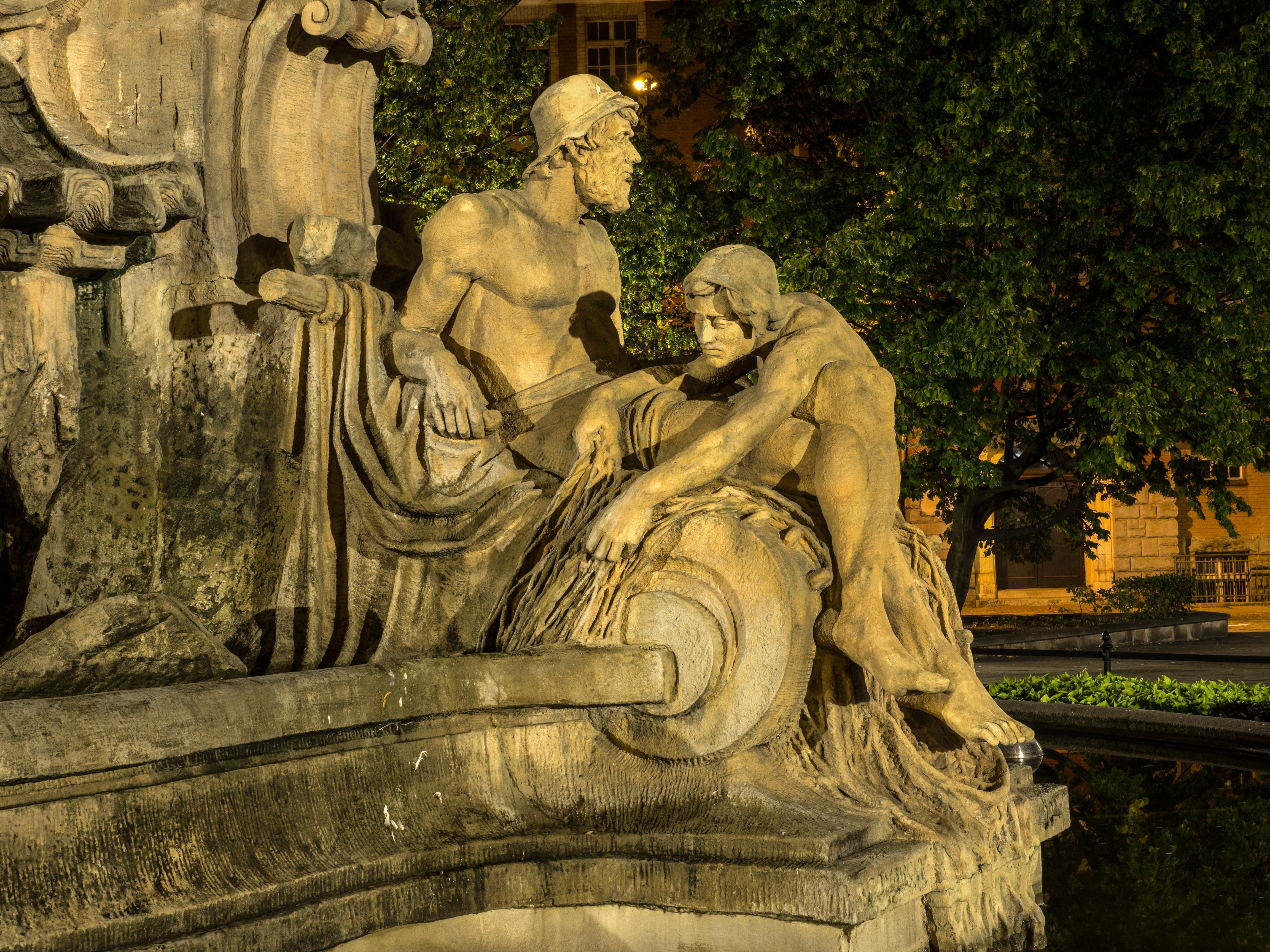 Opole - Opolska Ceres